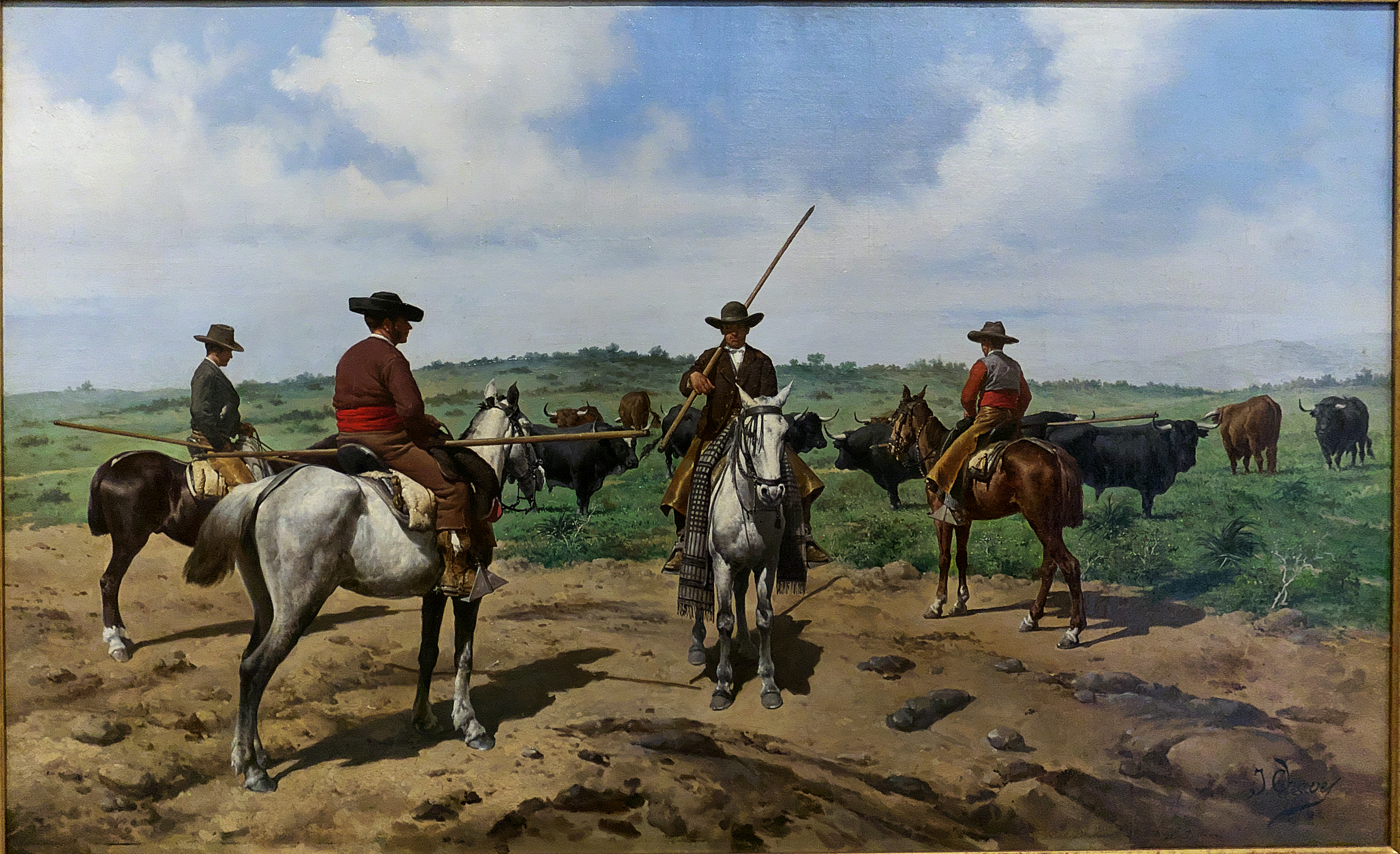 Pintura costumbrista sevillana